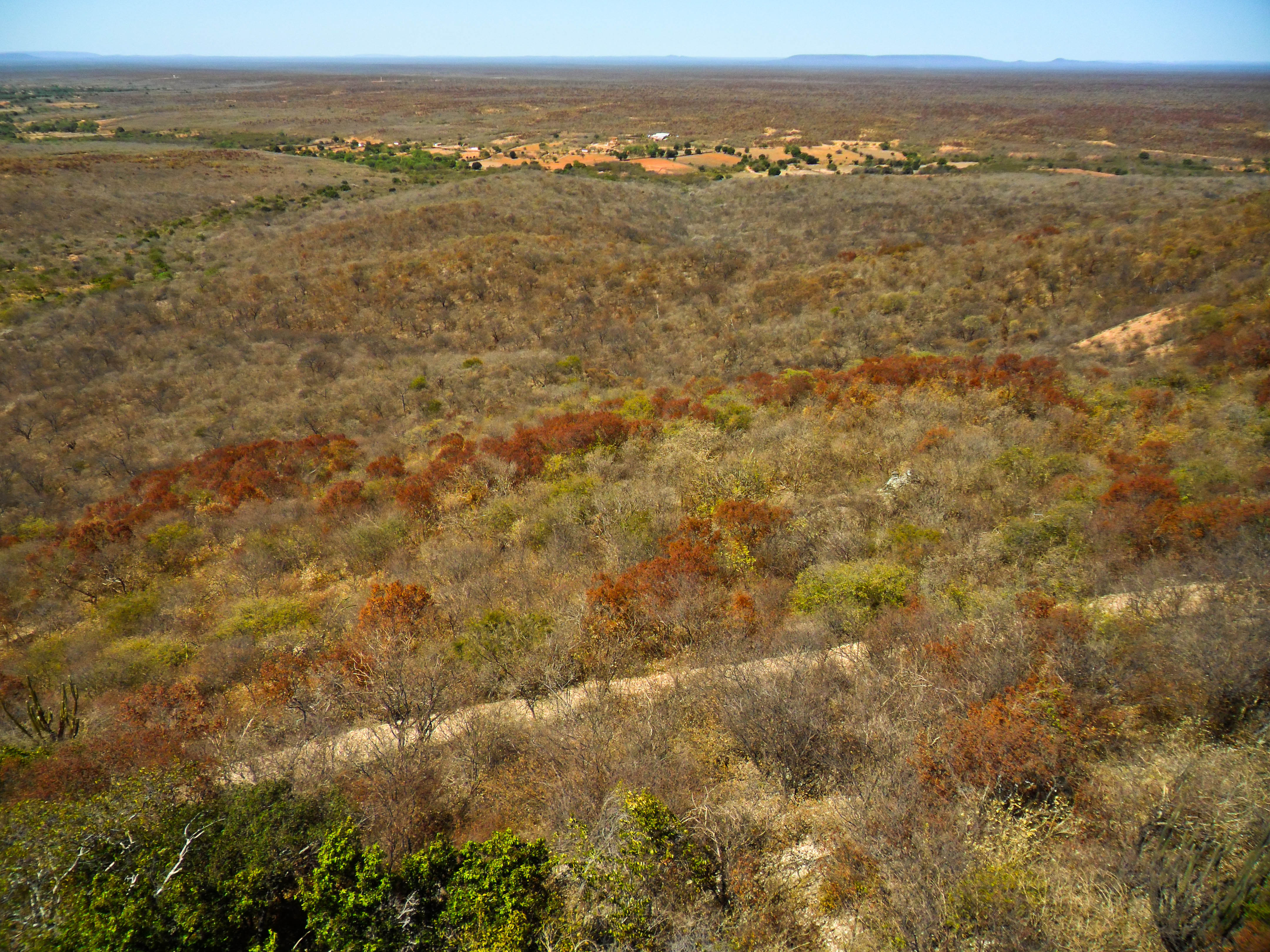 Insira_uma_descrição_para_sua_foto